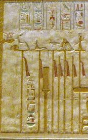 Enseignes sacrées conservées à Abydos auprès du porte-reliquaire